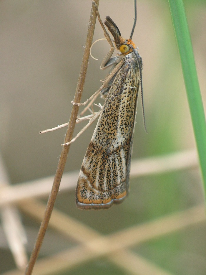 SCG, Vojvodina, Banat, Deliblatska Pescara, 2005.05.05 more info (in german)